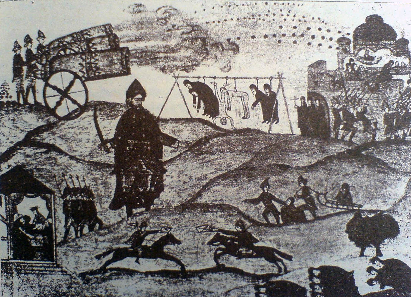 Казни соловецких иноков. По старинной старообрядческой иконе